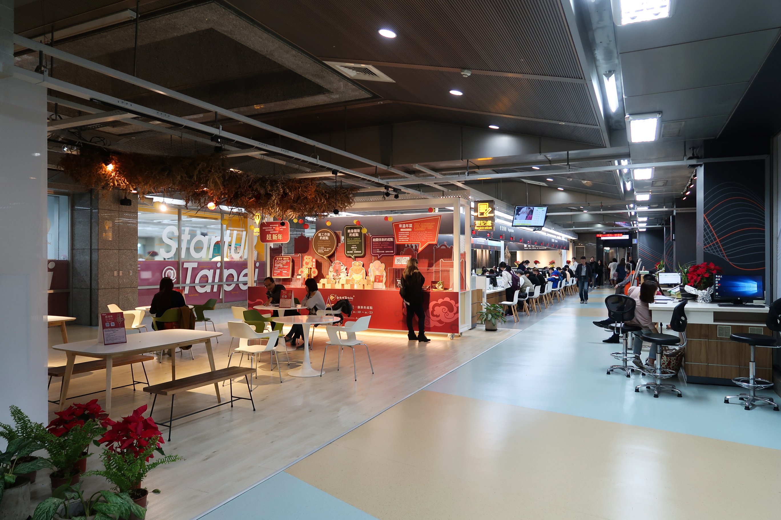 中文（台灣）: 臺北市市政大樓1樓，臺北市商業處服務櫃位。